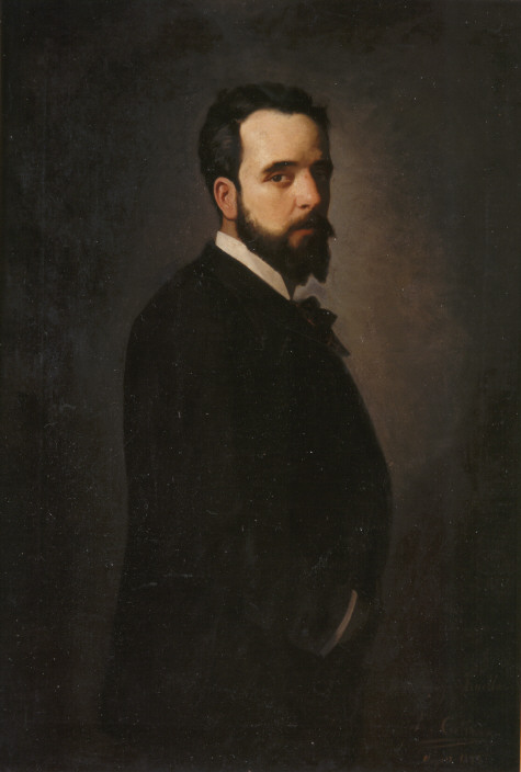 Retrato del compositor español Manuel Penella Raga (1847-1909).